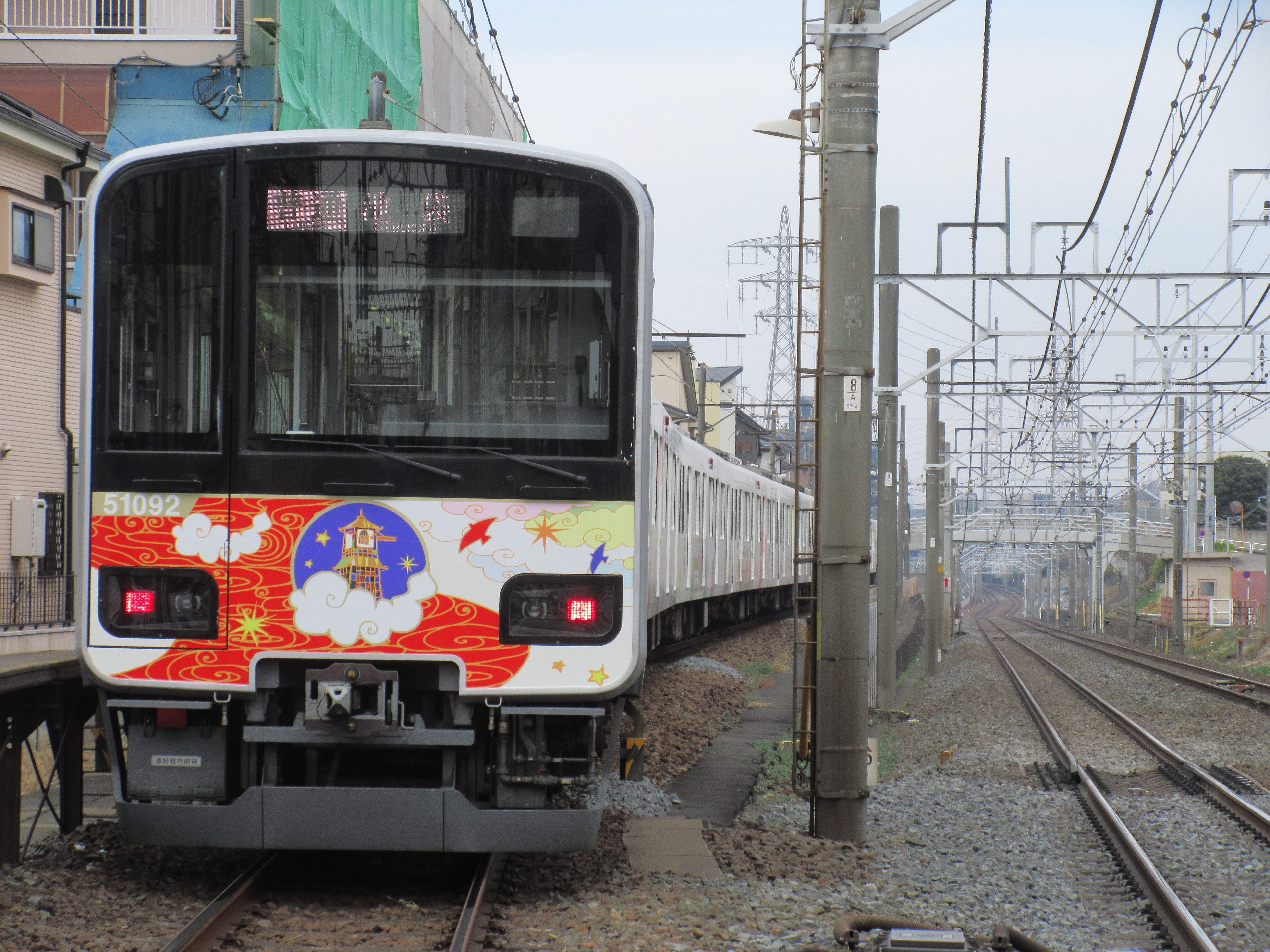 「池袋・川越アートトレイン」ラッピングとなった51092編成 （2019年2月25日 成増駅）